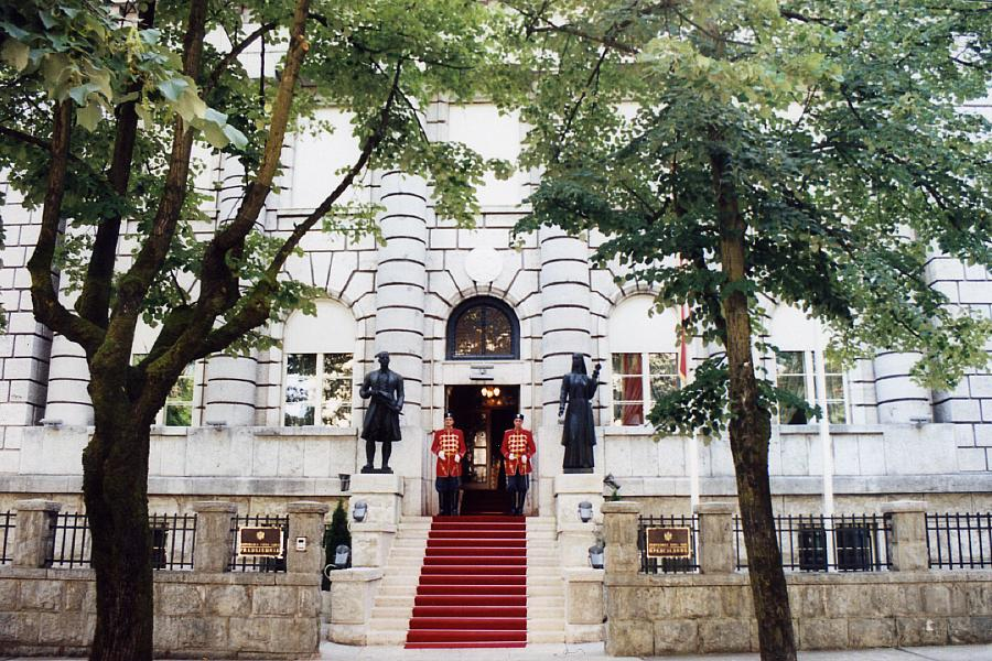 Entrance to Presidential Palace in Cetinje, Montenegro